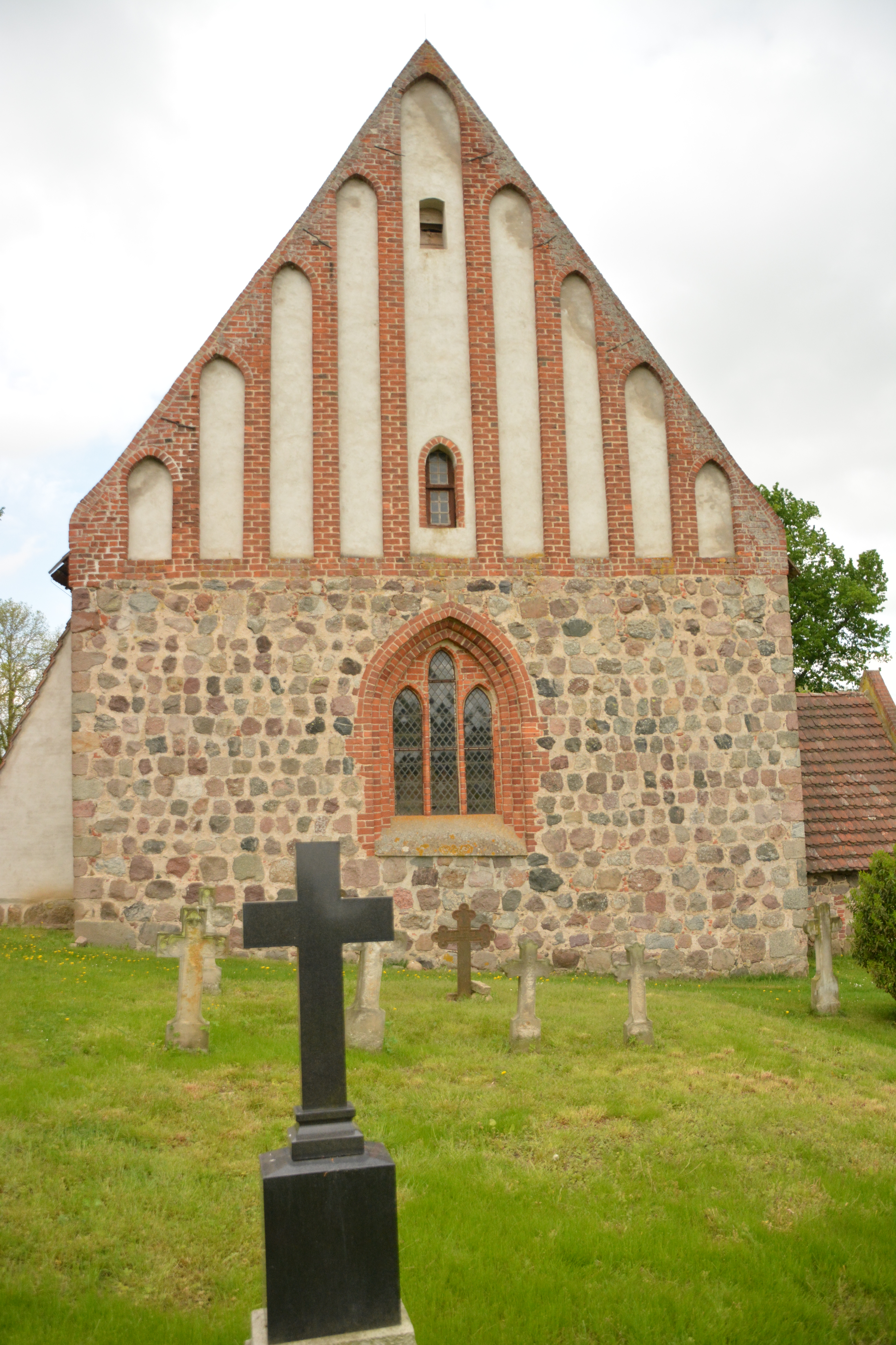 Dorfkirche Badendiek Ostgiebel